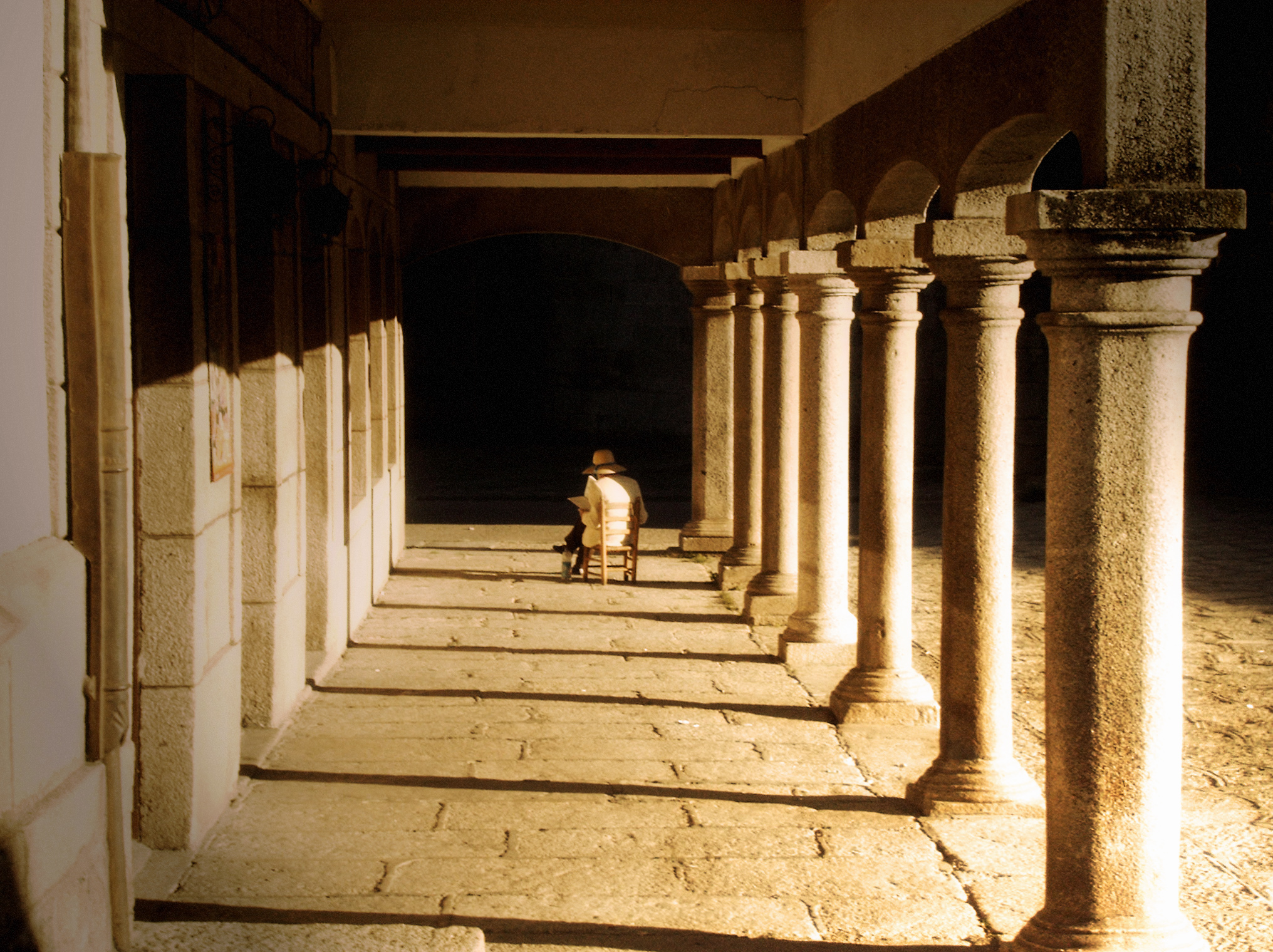 soportales (elcordon.es)